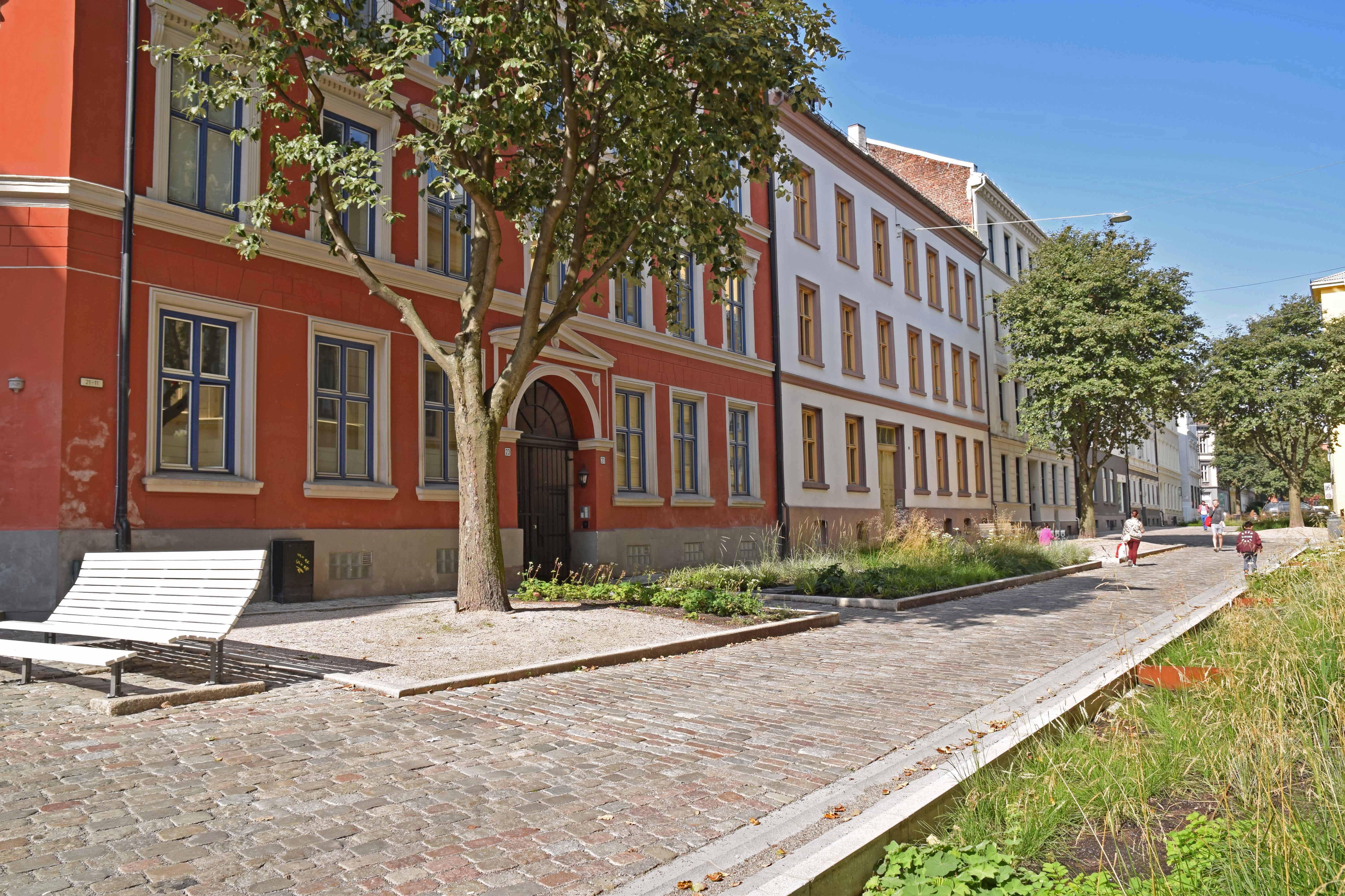 Deichmanns gate 21, rød bygning, og nylagt gategulv i Deichmanns gate 2017